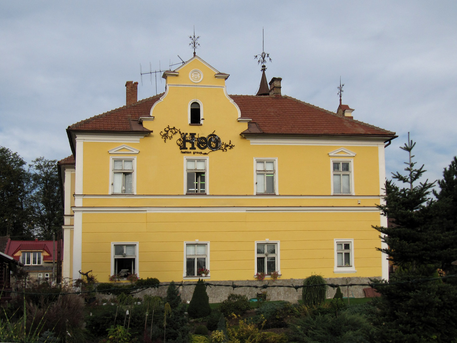 KAŠTIEĽ, Bytčica, Dlhá ul. 9. Vznik: 50.roky 19.storočia